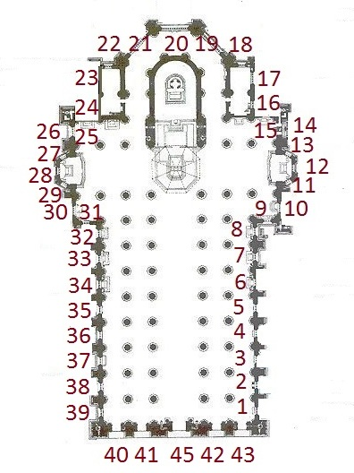 Duomo di Milano, pianta con elenco delle vetrate